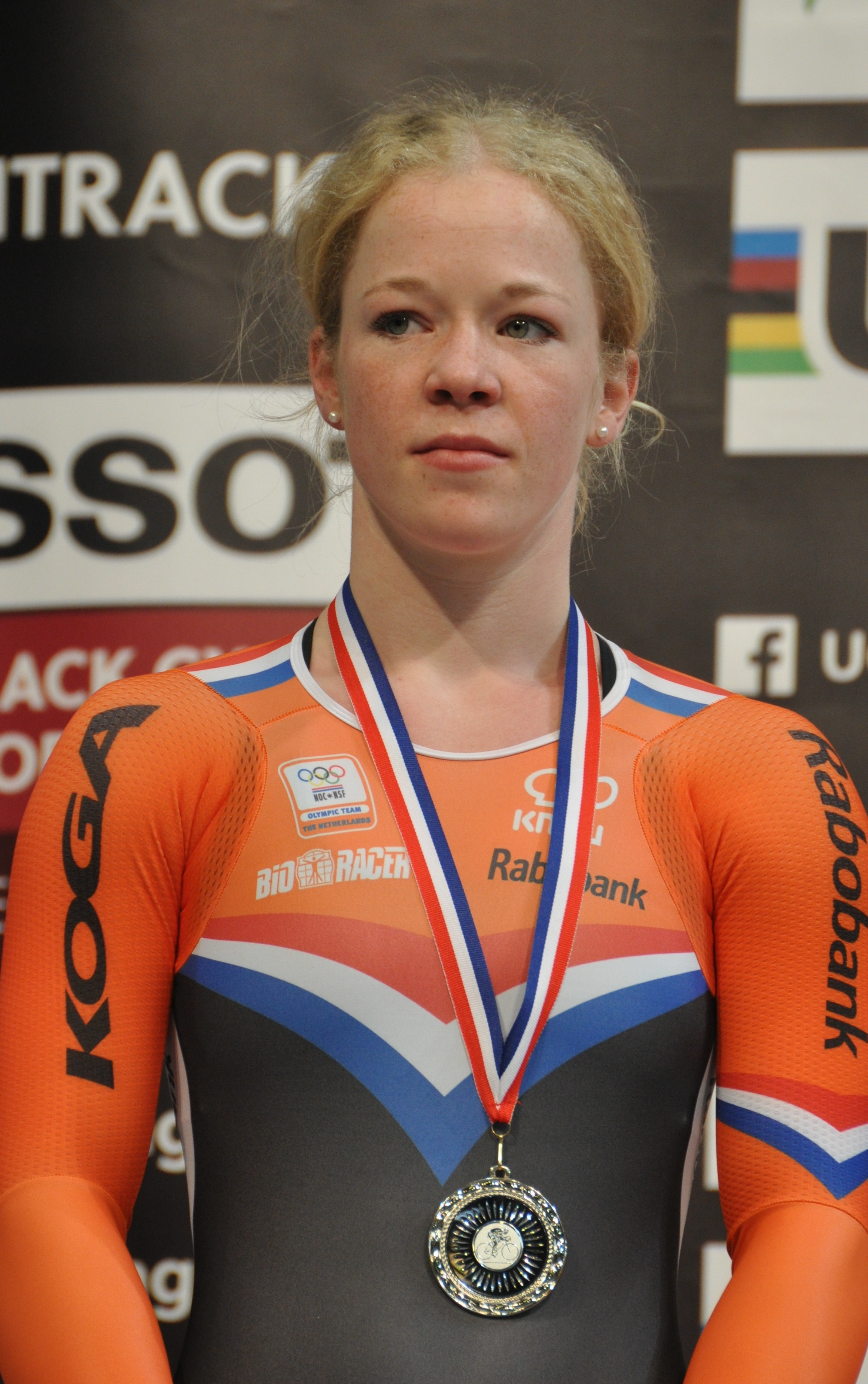 Kyra Lamberink, niederländische Radsportlerin: Silber im Teamsprint